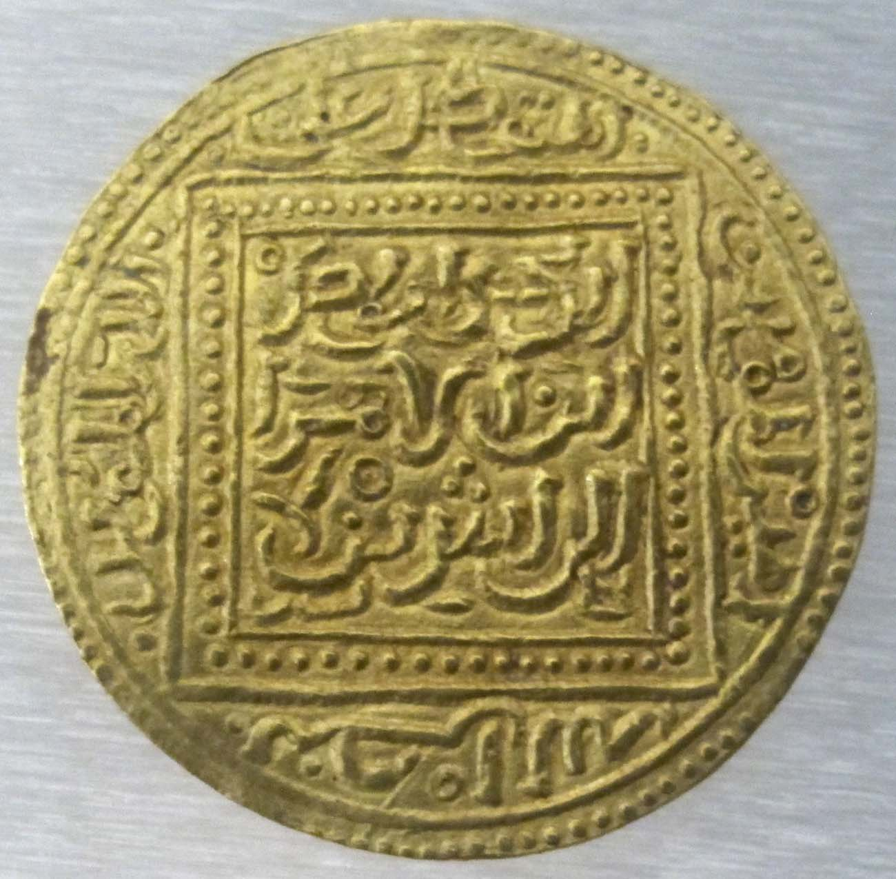 Tunisia, emiro abu bakr II, dinar hafside, 1318-1346